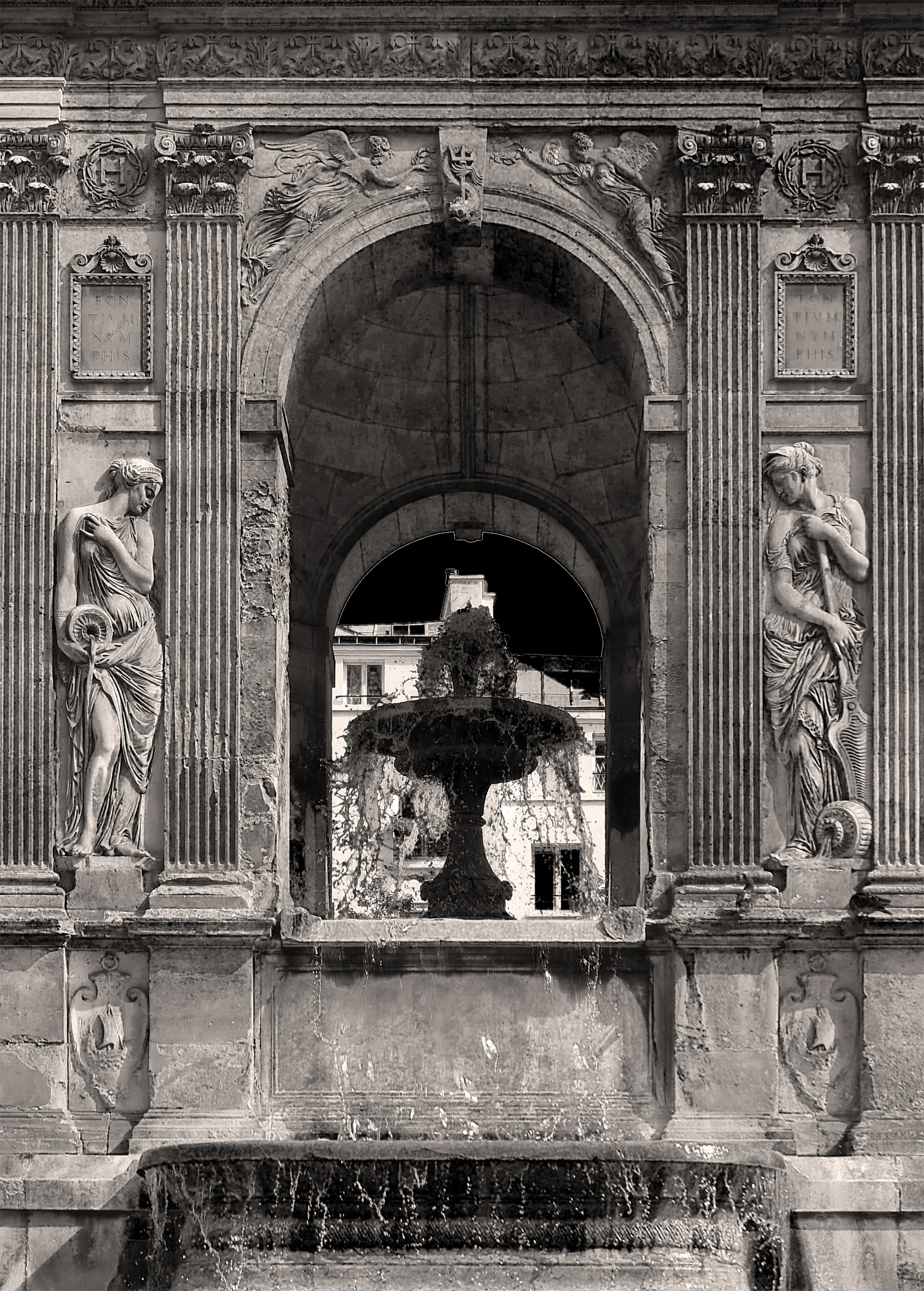 Face méridionale de la fontaine des Innocents - Paris Ier